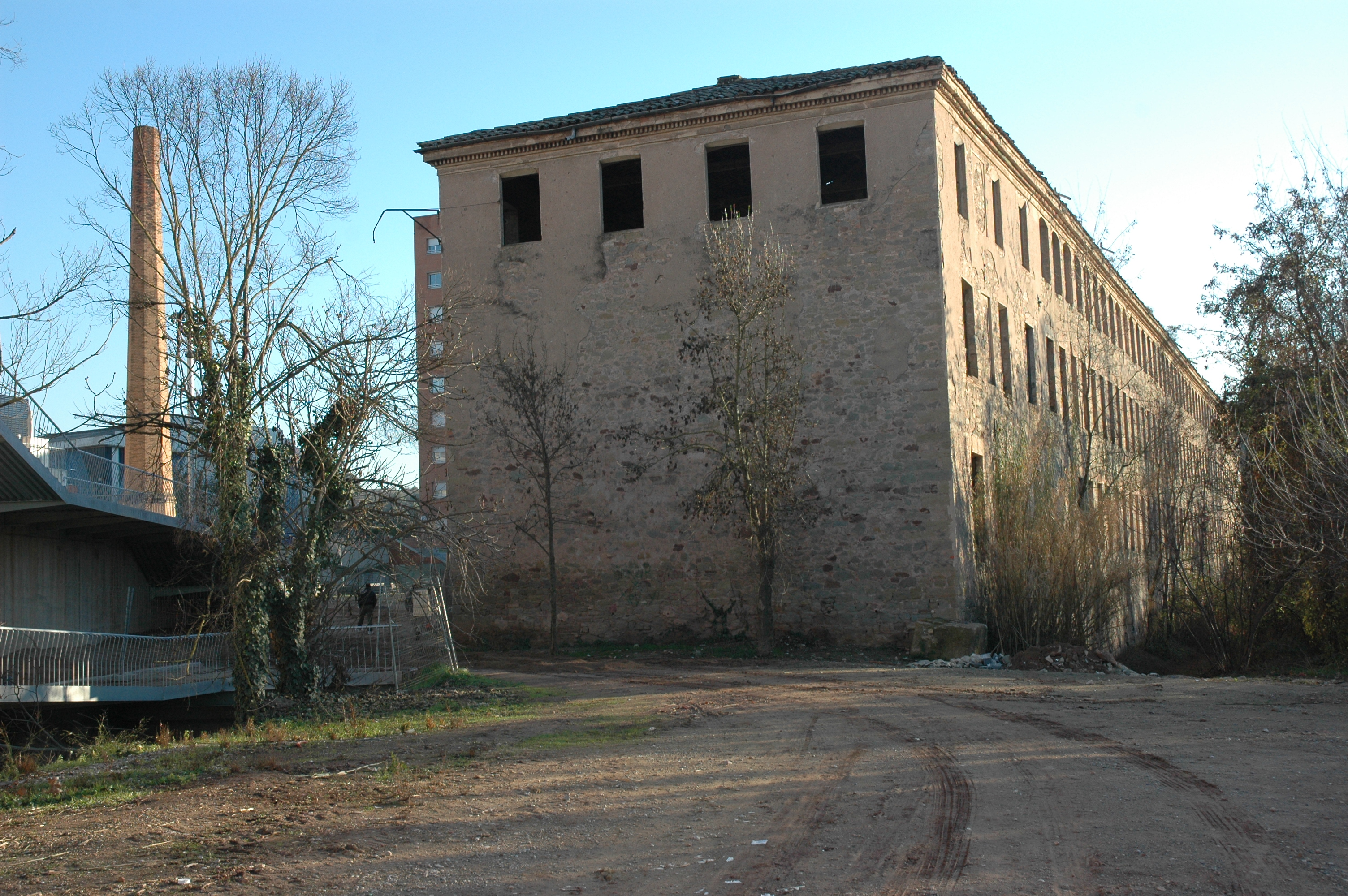 Manresa - Fàbrica dels Panyos - Lateral